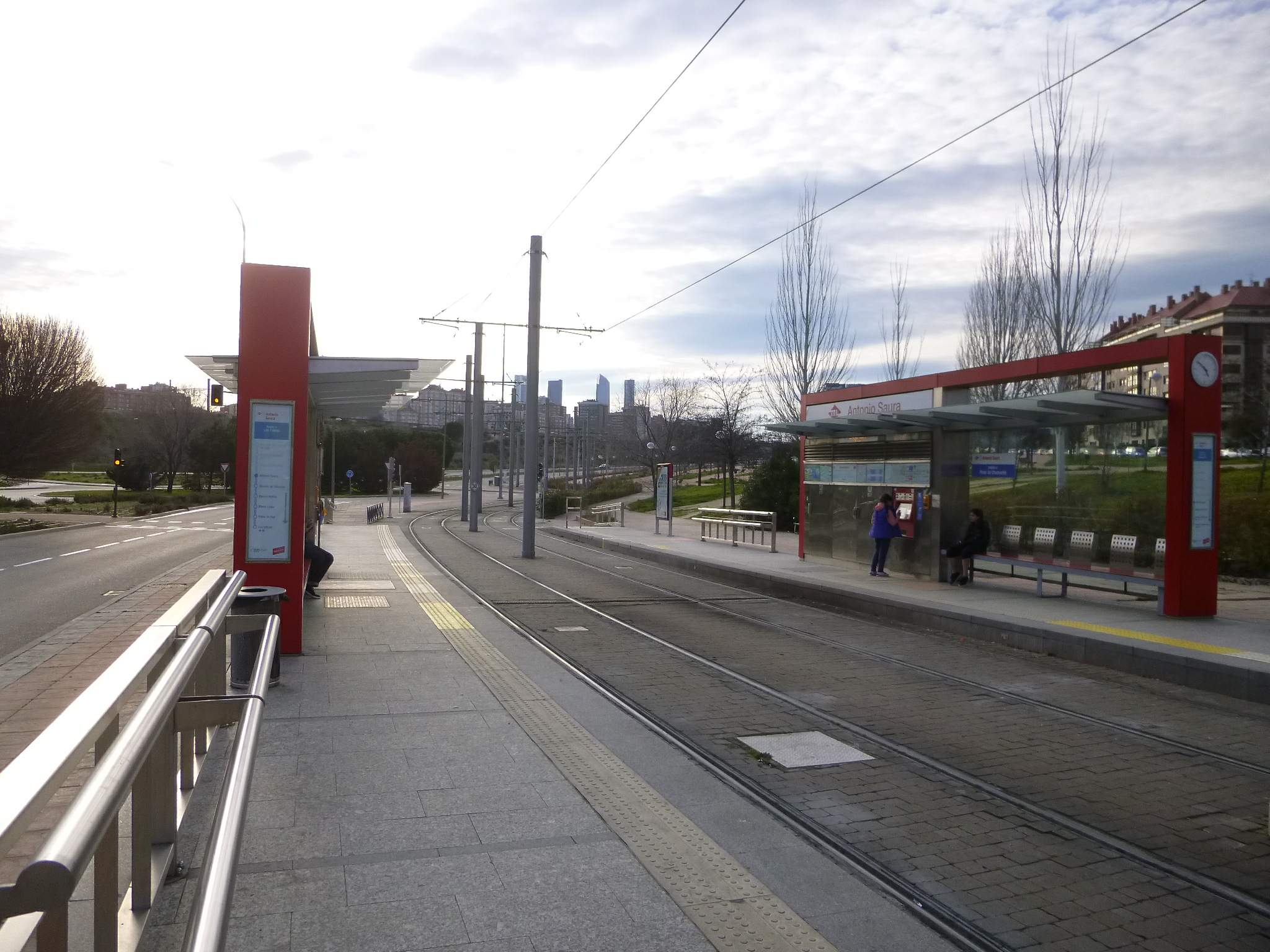 Estación de Antonio Saura, del Metro Ligero de Madrid